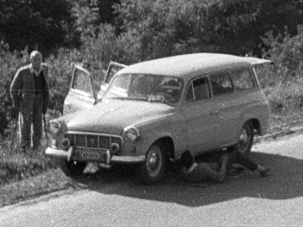 Tags: automobile, landscape